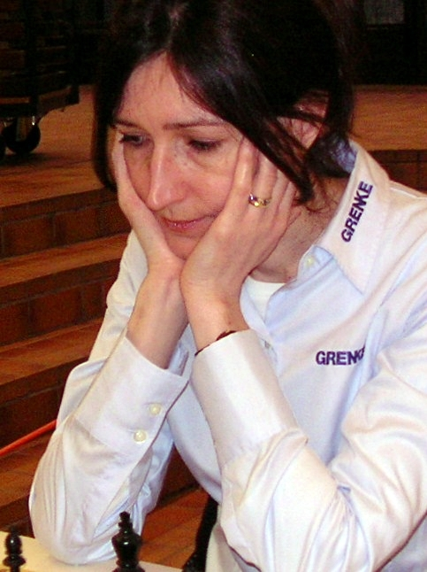 Ketewan Arachamia-Grant, Schachbundesliga der Frauen am 20. Januar 2012 in Karlsruhe.